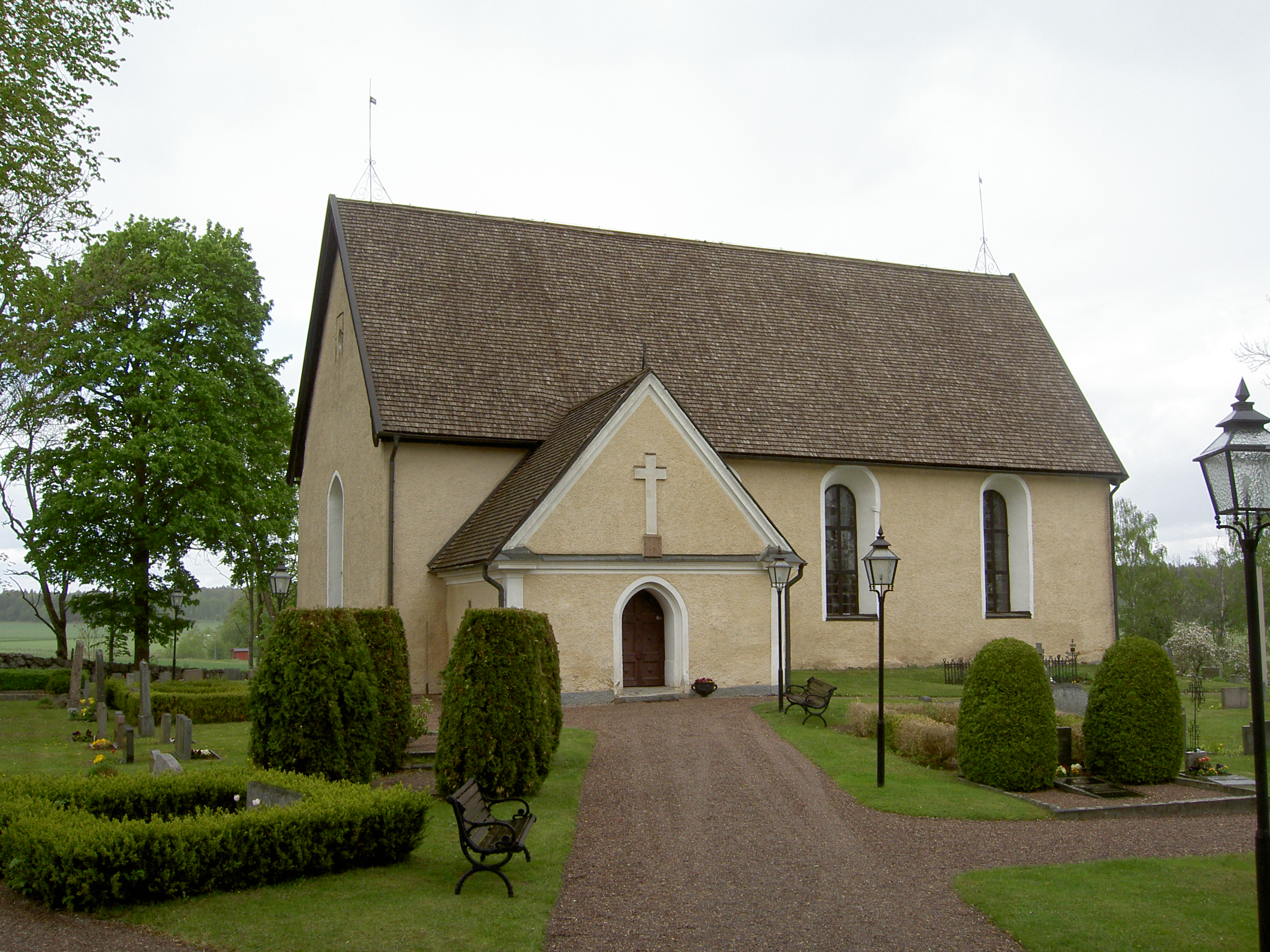 Lagga kyrka